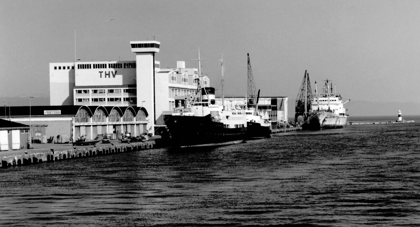 Hurtigruten Polarlys, Yrjar og en tredje, ukjent båt langs Pir II.